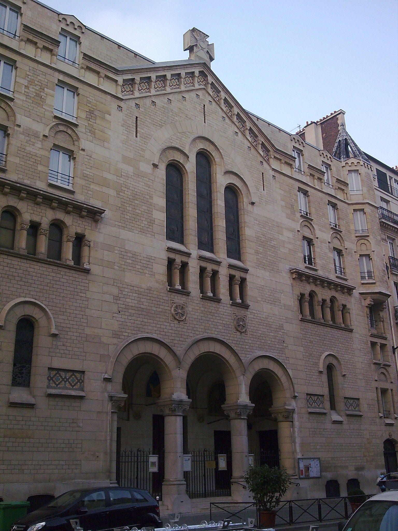 Ancienne église Saint François de Sales à Paris